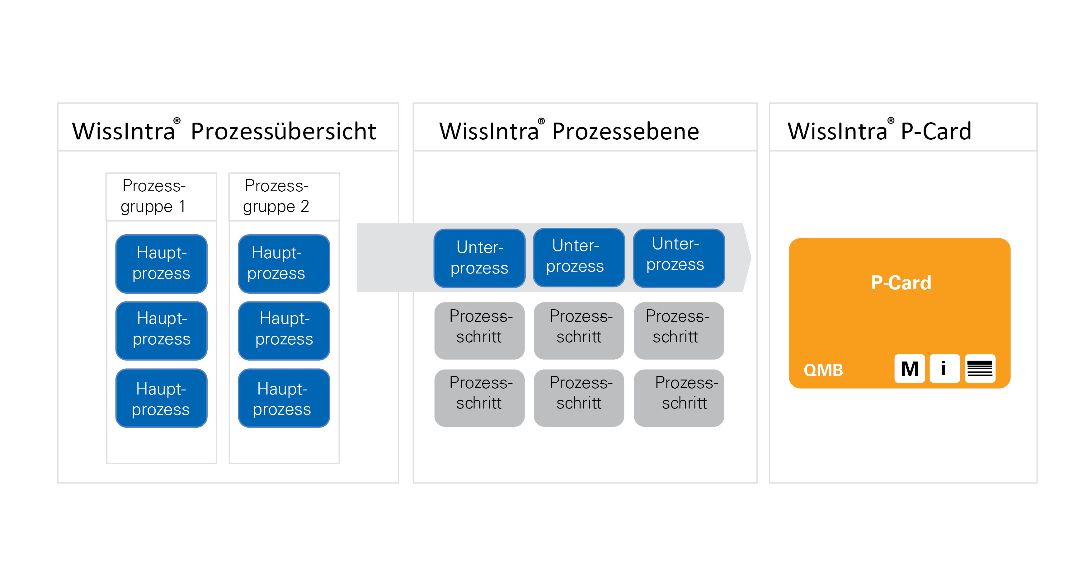 Schematische Darstellung der WissIntra Methode